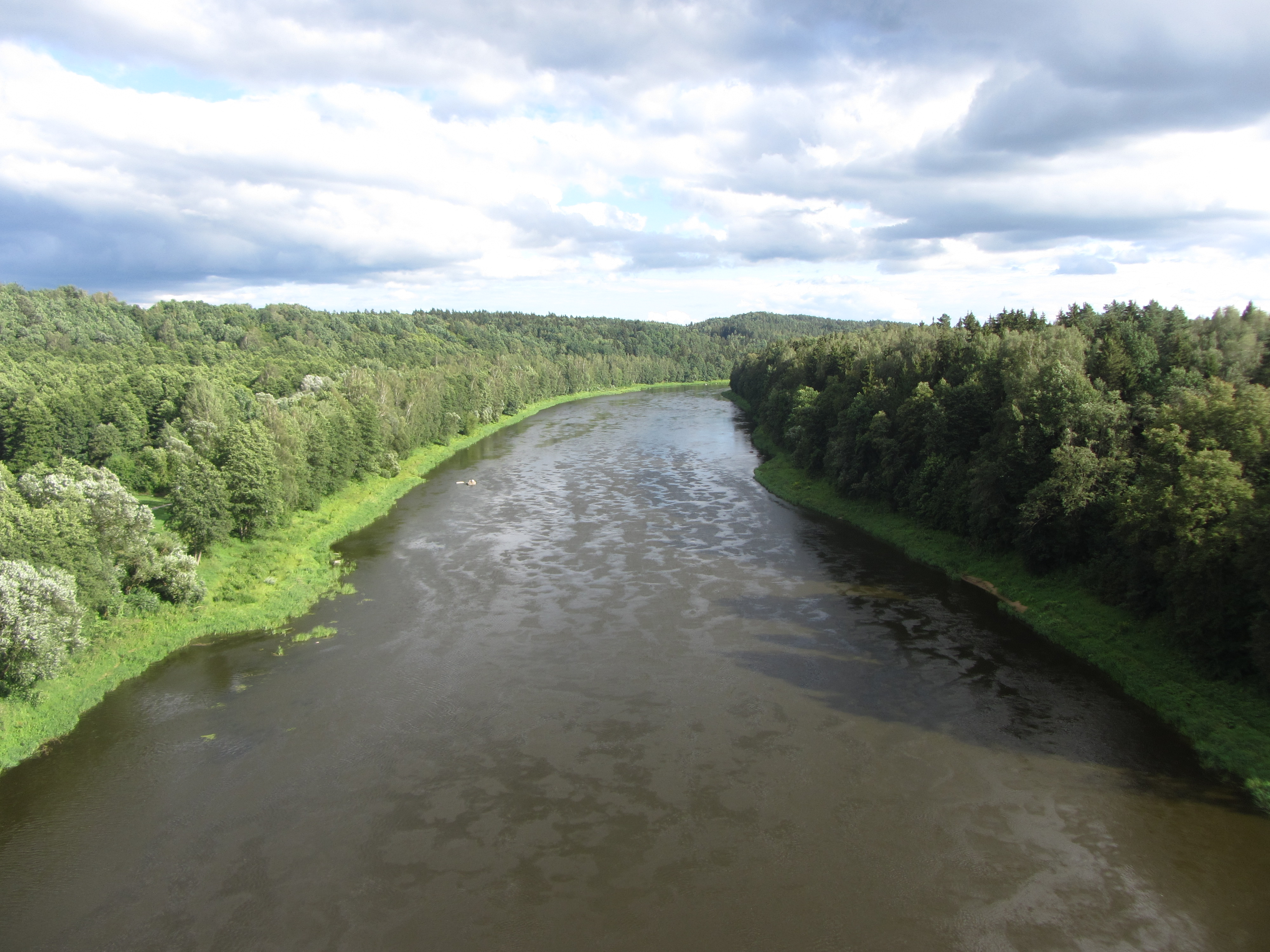 Alytus 62246, Lithuania